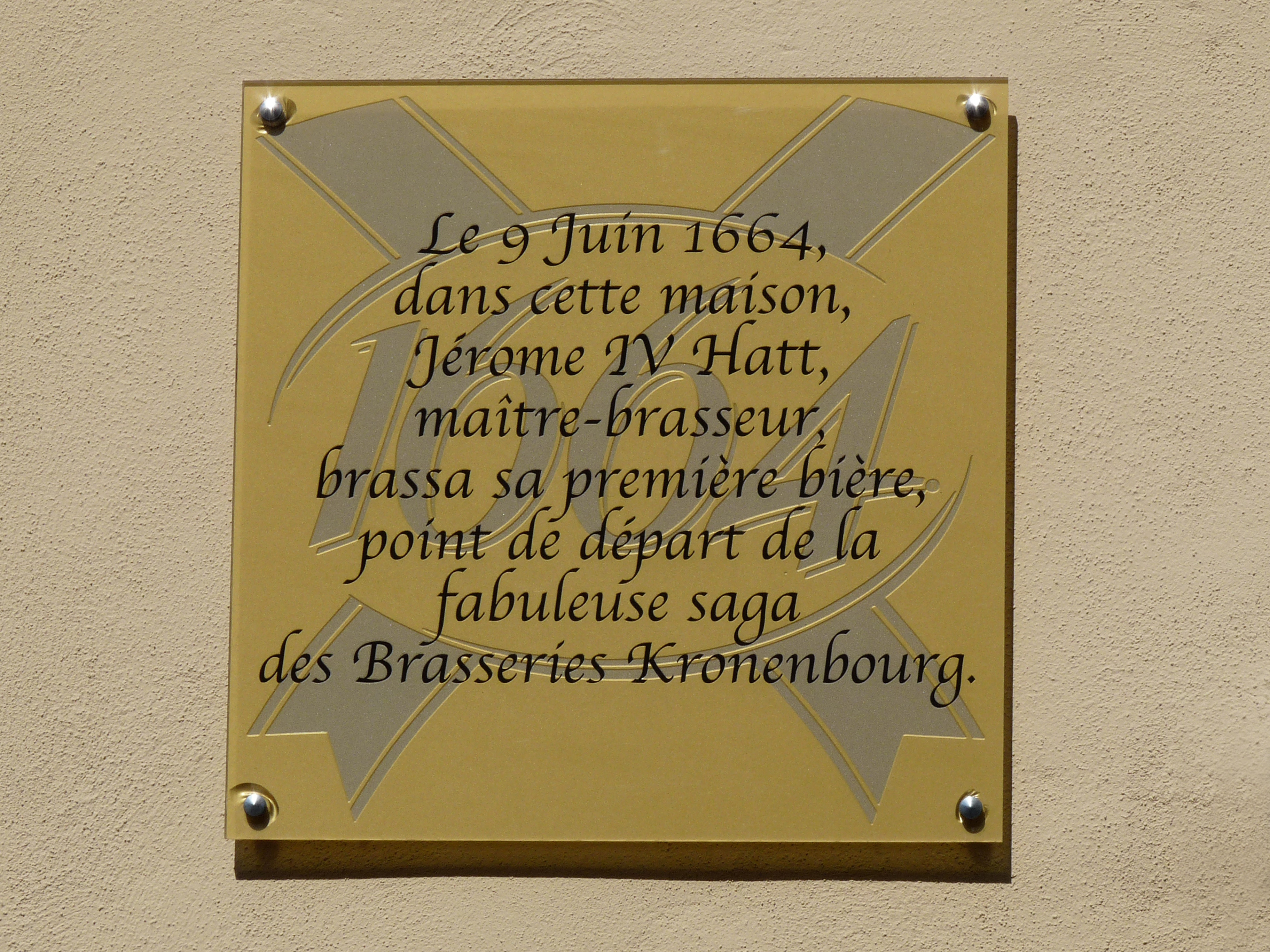 Strasbourg : plaque sur une façade du restaurant Au Canon, à l'angle de la place du Corbeau et du 1 de la rue d'Austerlitz. En 1664 Jérôme Hatt brassa sa première bière dans cette maison.